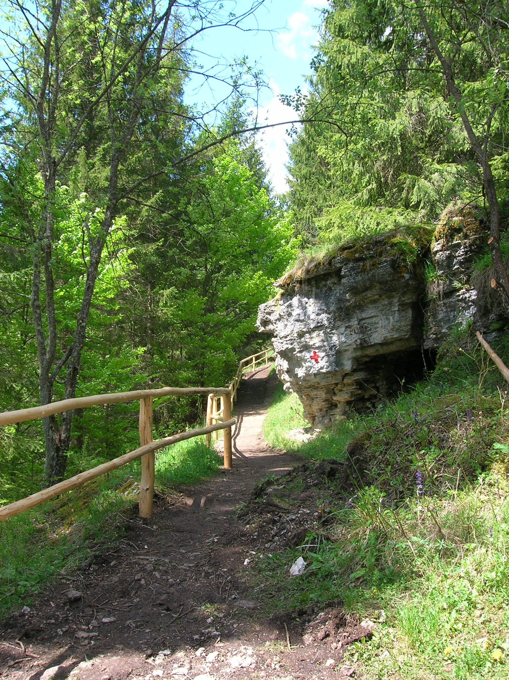 Din Rezervaţia Scaunul Rotund